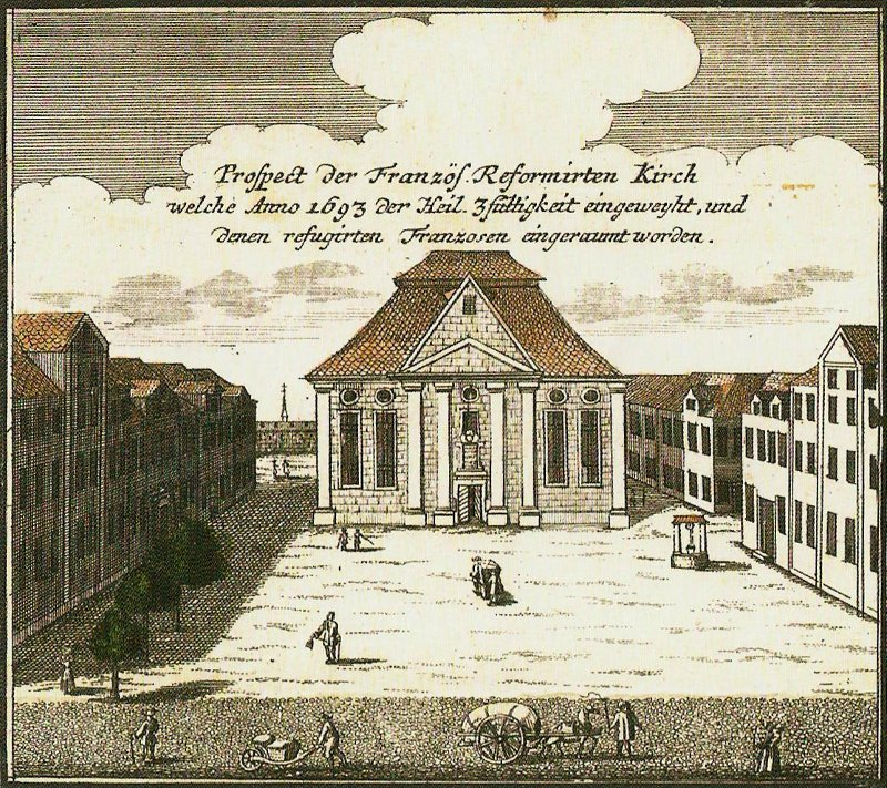 Ansicht der Französisch-reformierten Kirche in Erlangen. Randbild aus dem Homannschen Stadtplan.